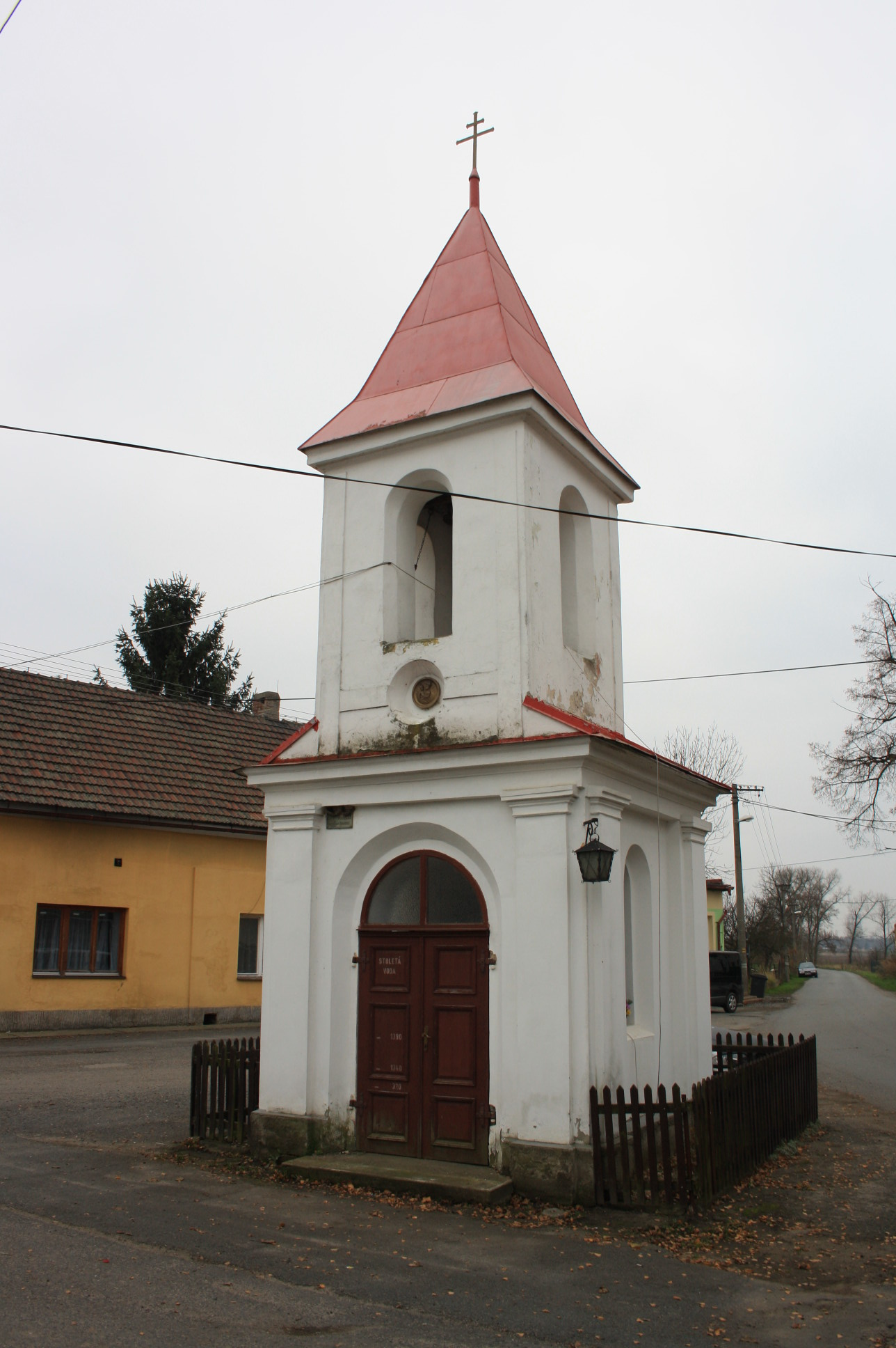 Kaplička svatého Václava v obci Kly (pohled od severozápadu).